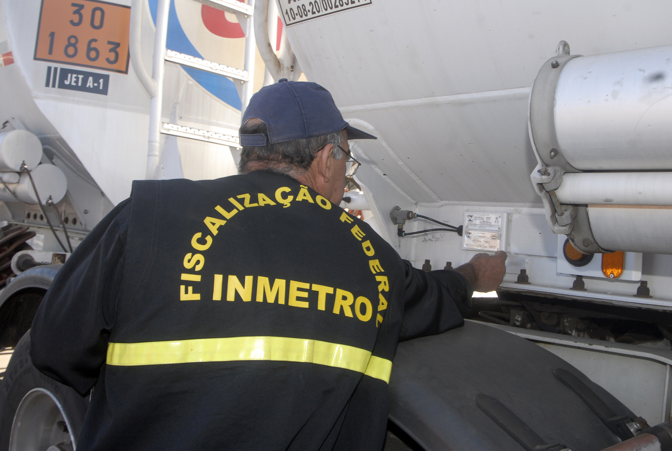 Fiscal do Inmetro vistoria caminhão que transporta produtos perigosos no Distrito Federal.